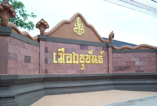 ป้ายเมืองขุขันธ์ หน้าที่ว่าการอำเภอ